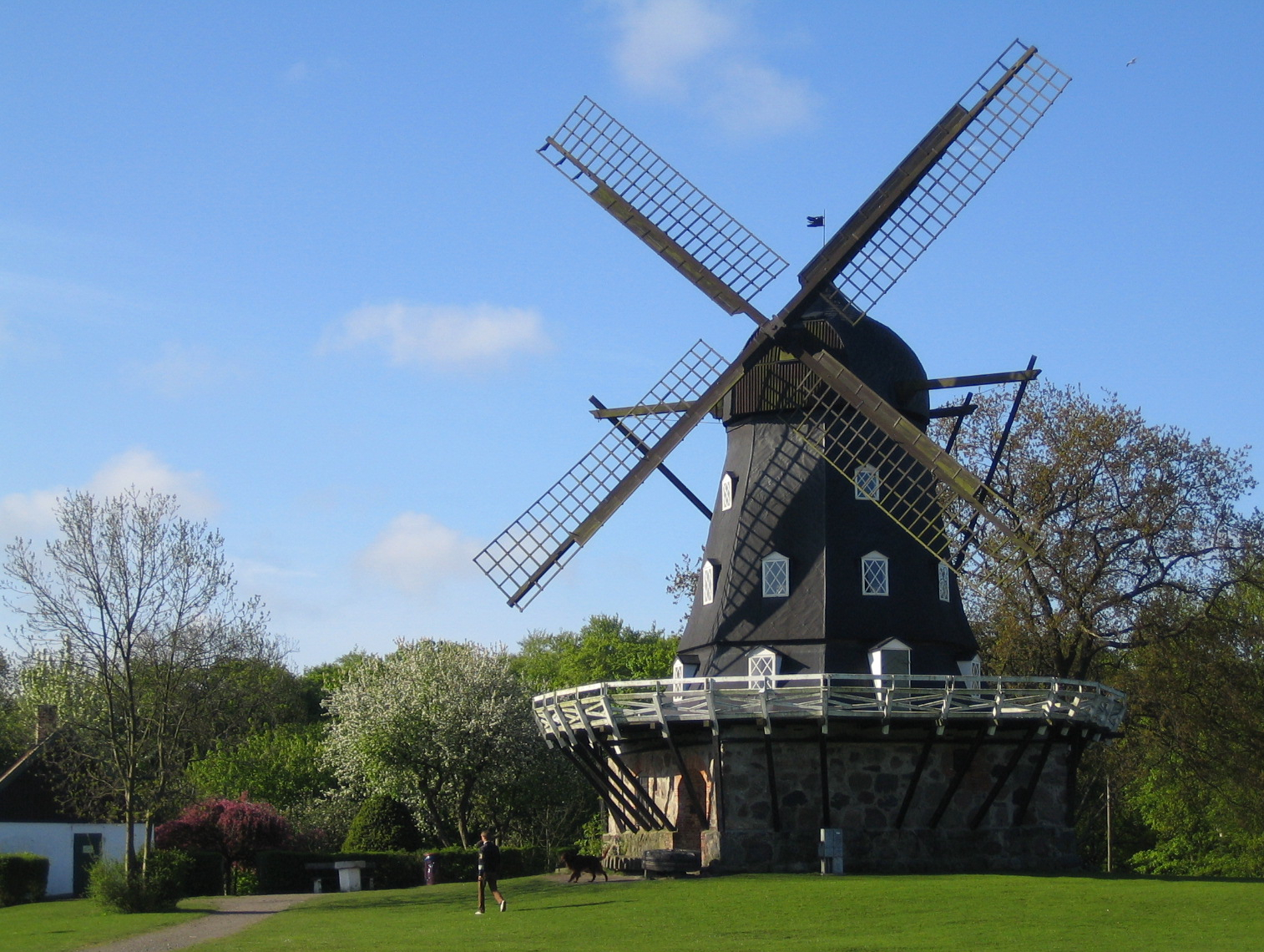 Slottsmöllan, Malmö